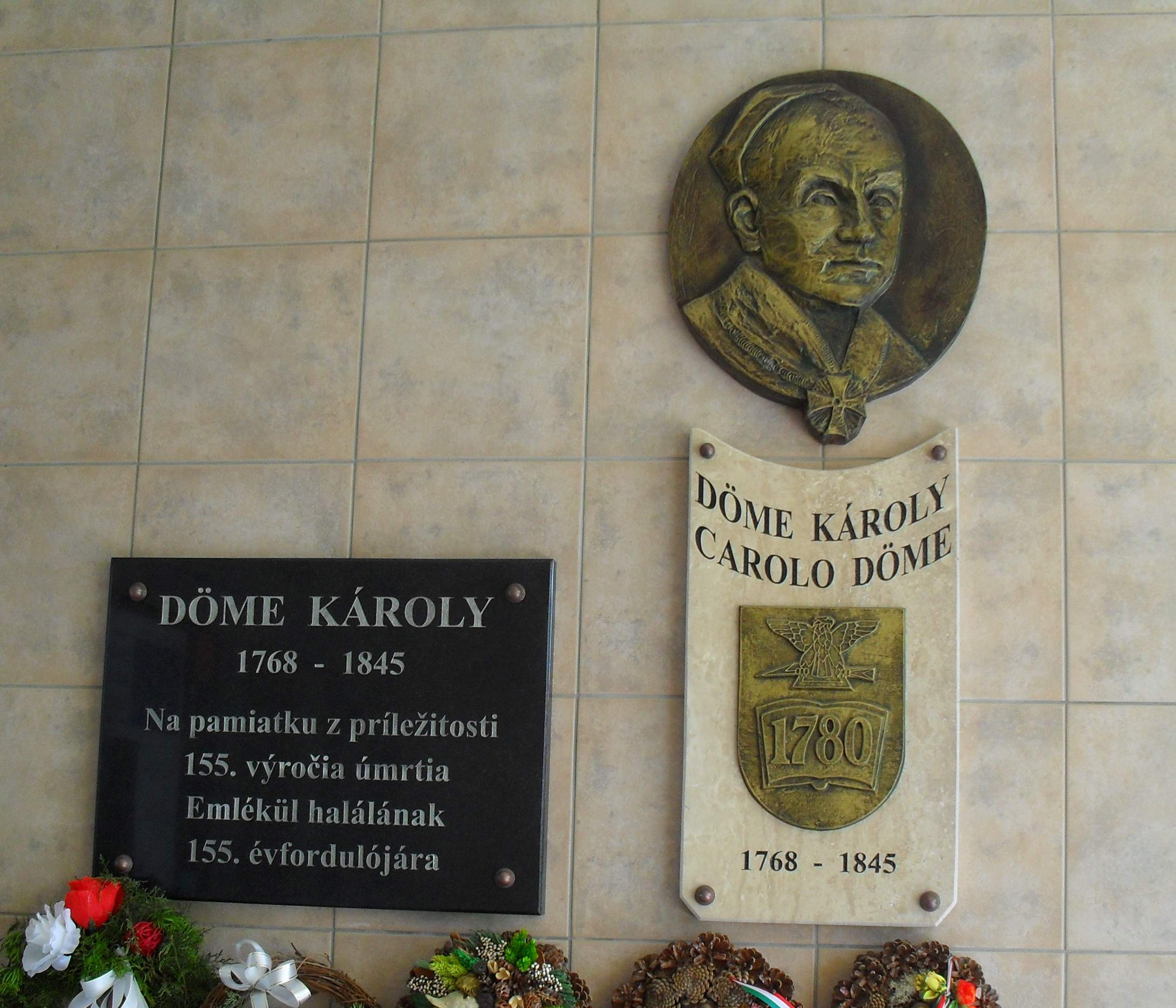 Izsa - Döme Károly emléktábla az alapiskola bejáratánál